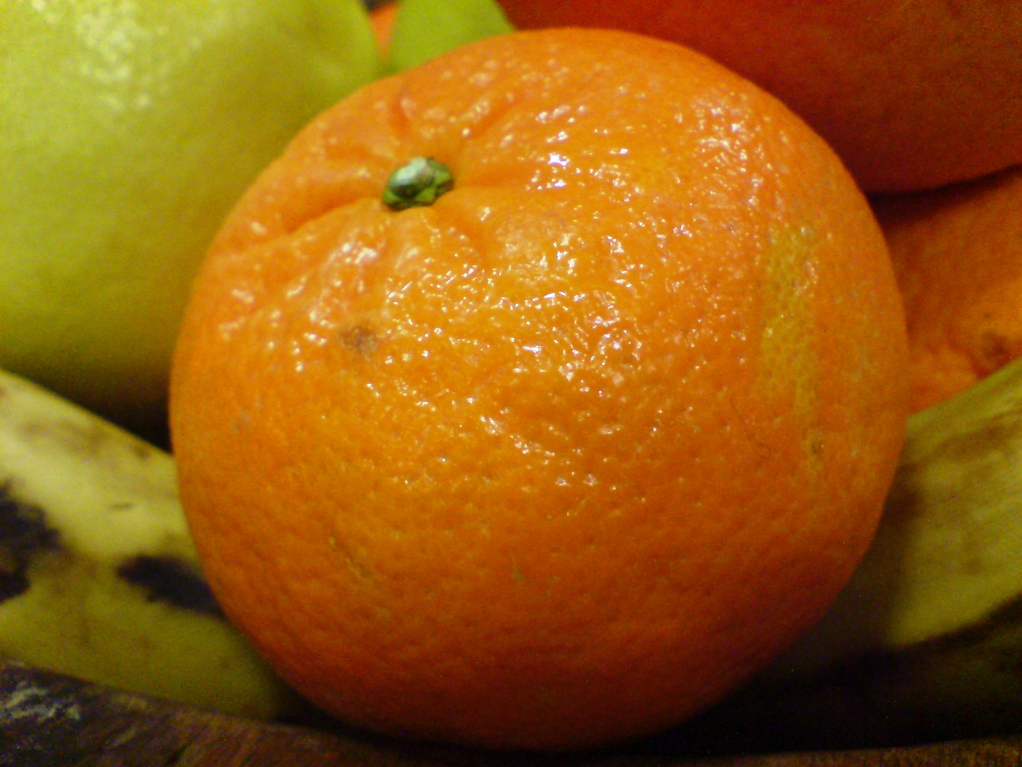 תפו"ז